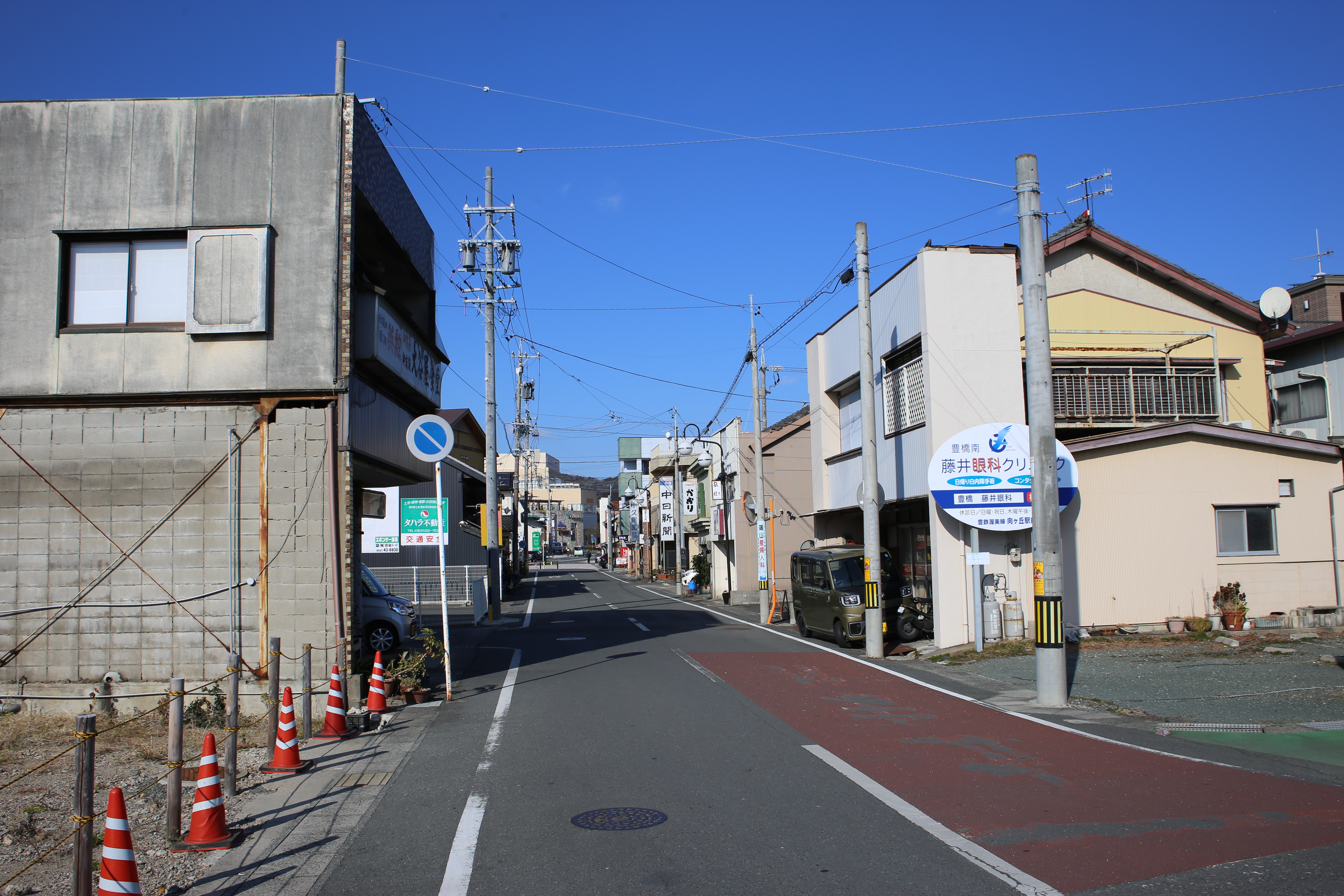 愛知県田原市田原町内の愛知県道413号六連三河田原停車場線起点付近